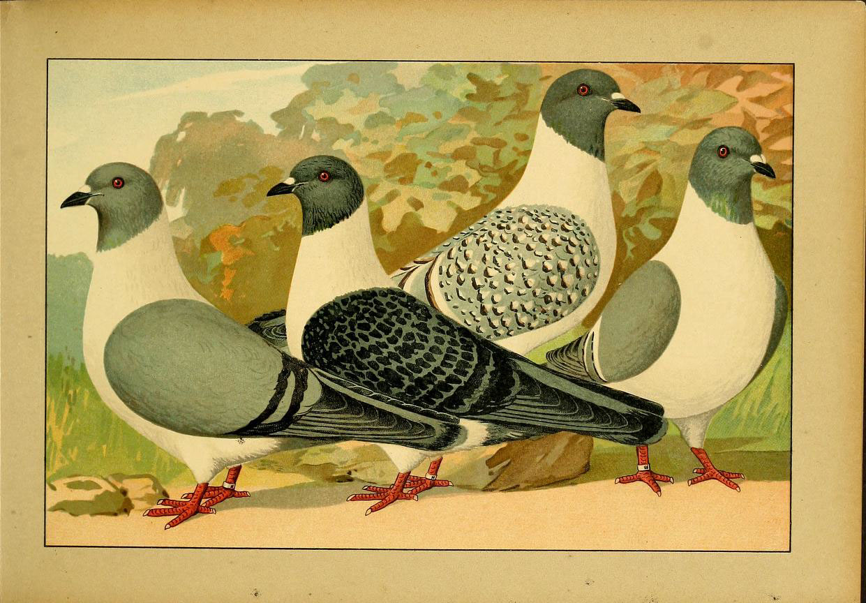 Illustriertes Prachtwerk sämtlicher Taubenrassen.